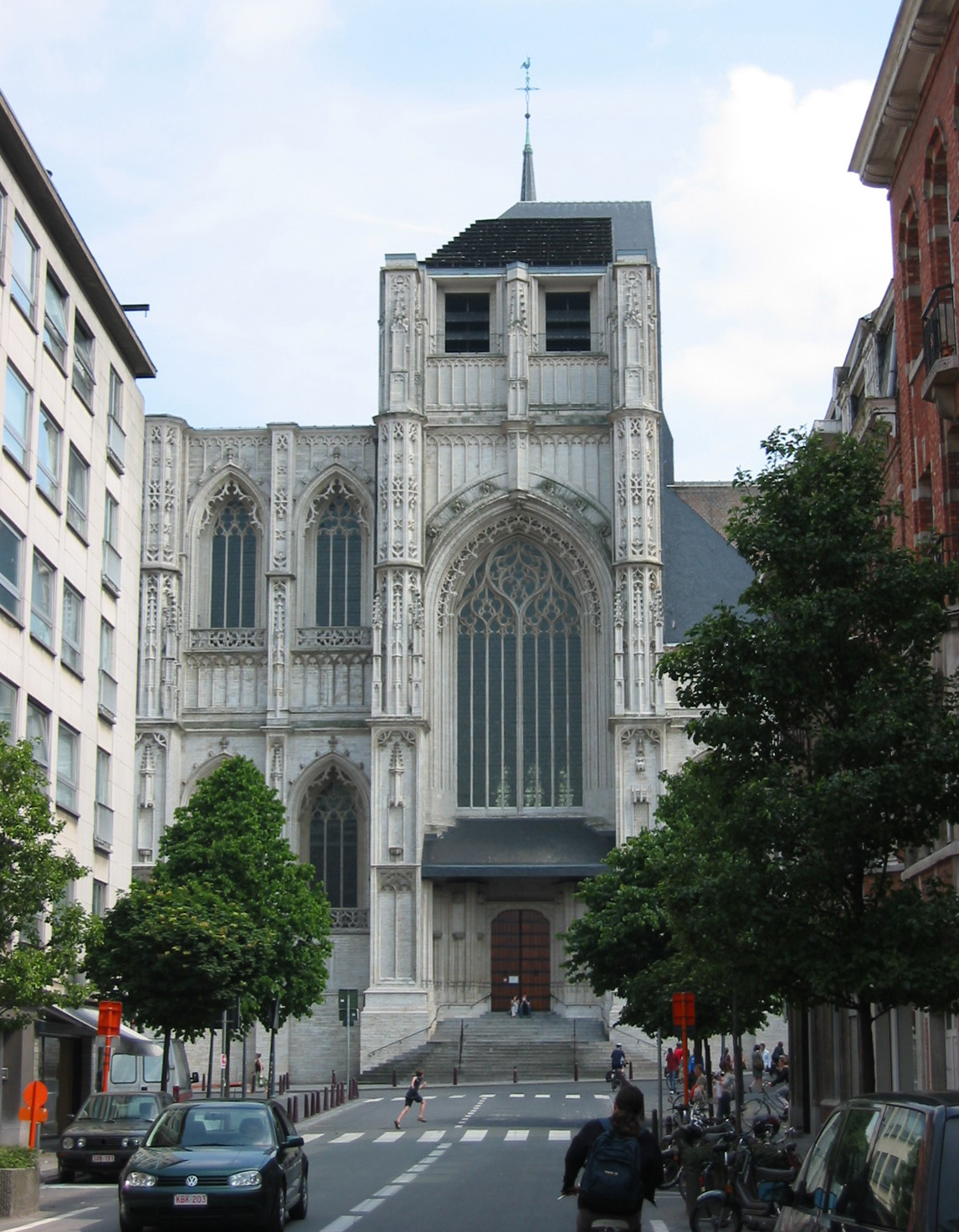 West front, Sint-Pieterskerk, Leuven